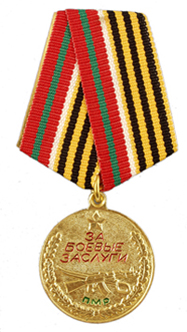 PMR state order